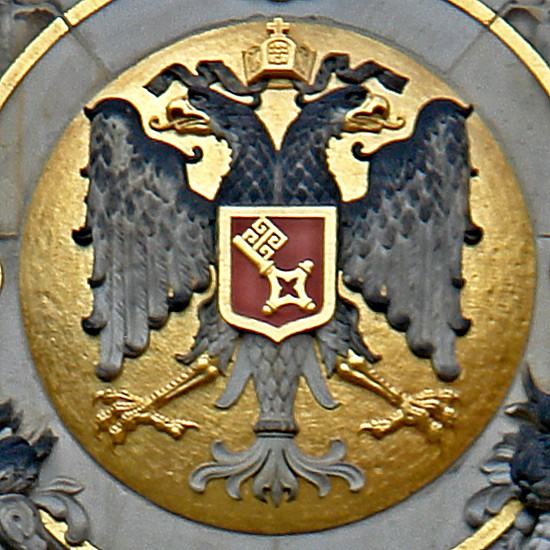 Haus Schütting am Bremer Marktplatz. Wappen am Portal